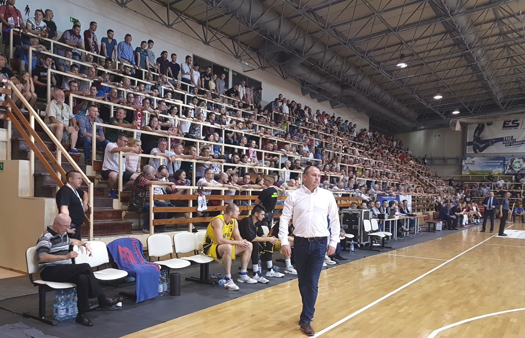 Mecz Spójnia - Sokół (13.05.2018)